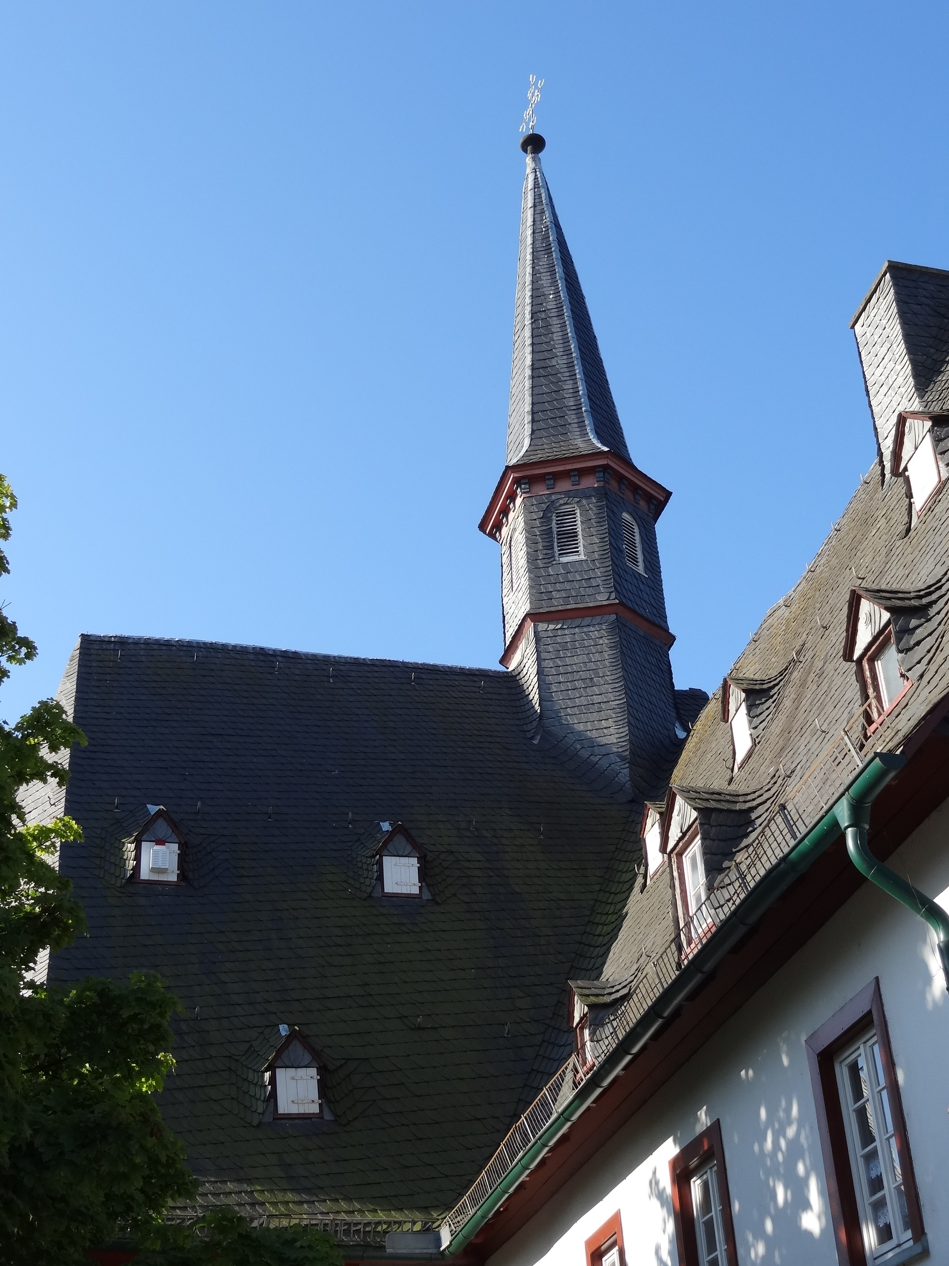 Ehemalige Hospitalkapelle St. Wendelin (Butzbach)